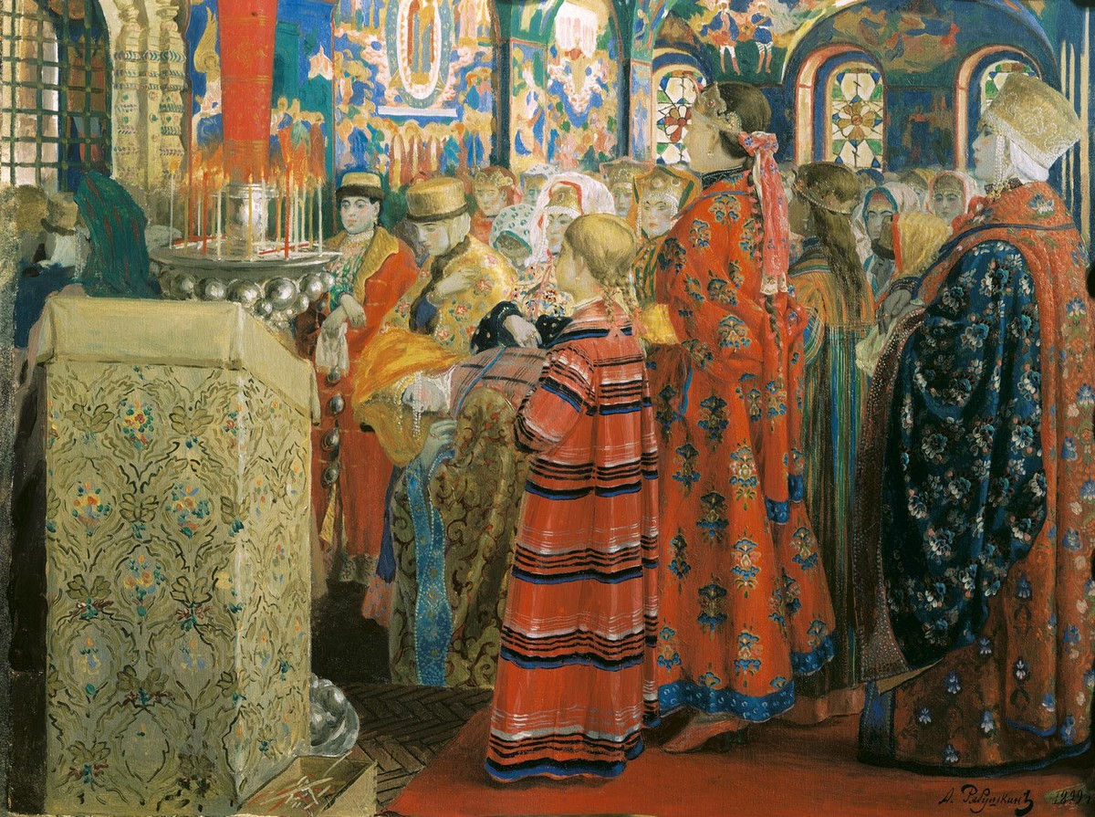 Русские женщины XVII столетия в церкви. 1899. Холст, масло. 53,5x68,8 см. Государственная Третьяковская галерея, Москва